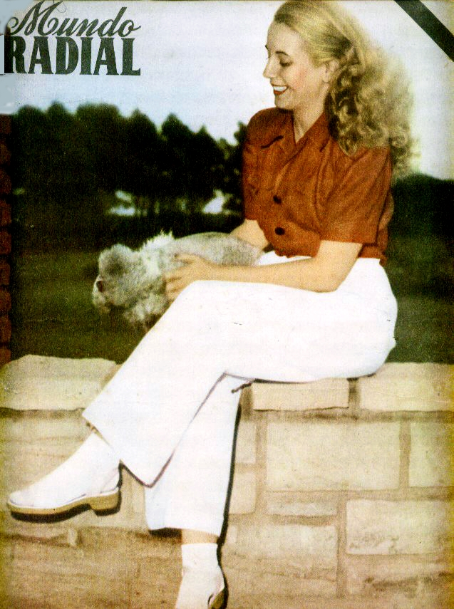 Ley 11723